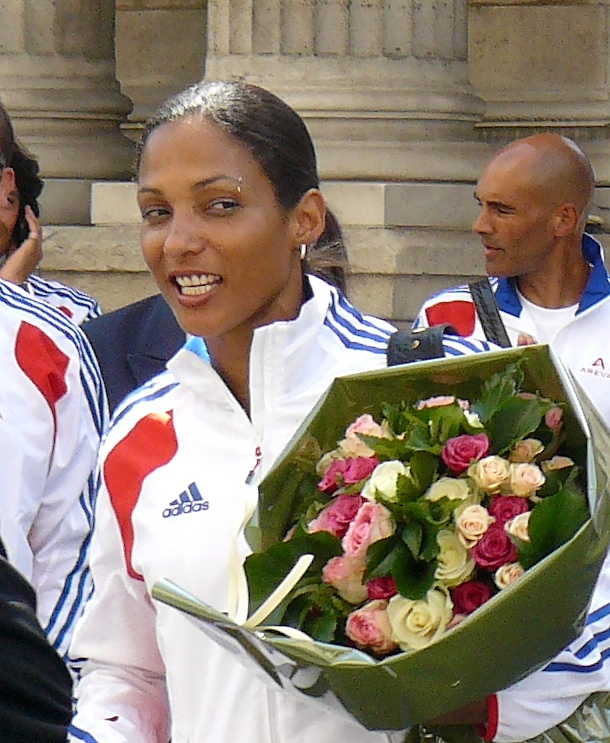 Christine Arron, athlète française (sprint), lors de la réception à l'Élysée des médaillés de Barcelone, le 3 août 2010.